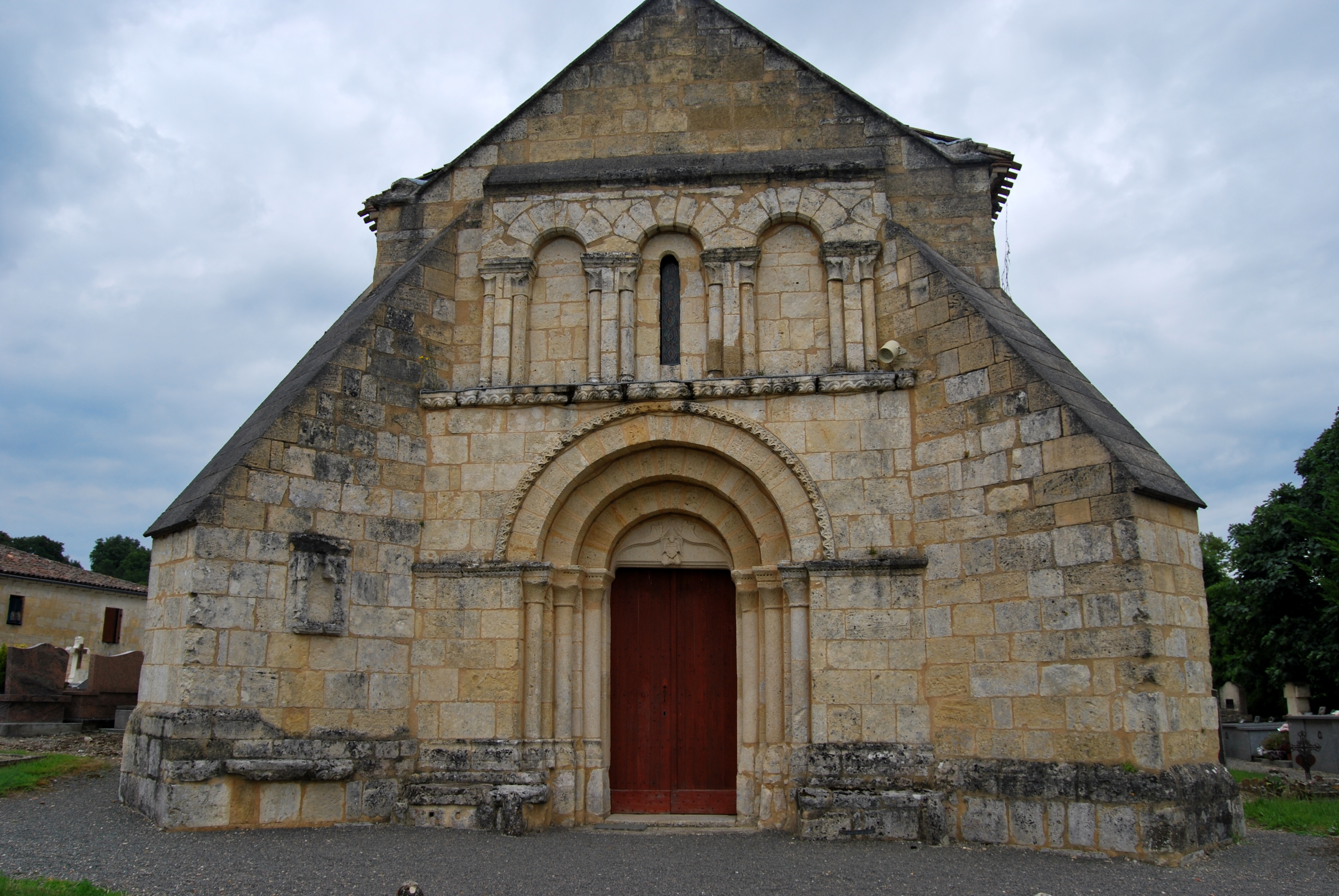 Église de Sainte-Colombe